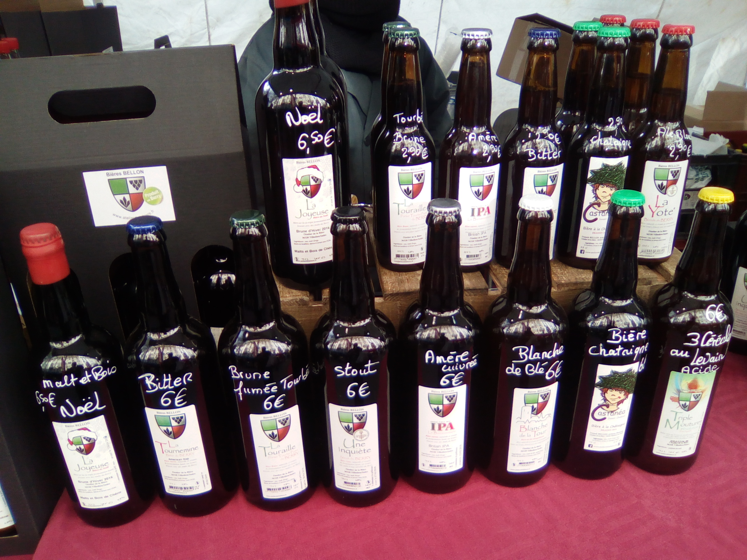 Stand des bières artisanales "Bellon", au marché des Producteurs de Pays, boulevard de Reuilly